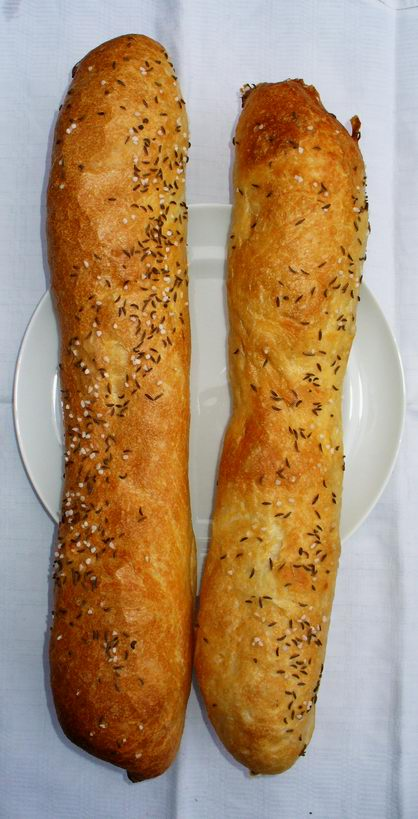 Schwäbische Seelen aus Biberach an der Riß - Bäckerei Grün